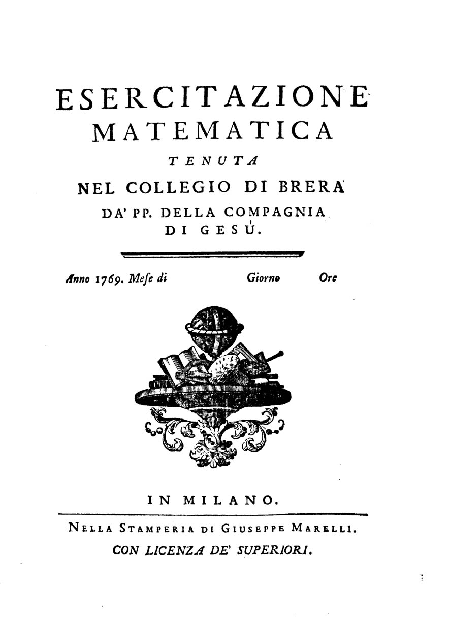 Esercitazione matematica tenuta nel Collegio di Brera da' pp. Della Compagnia di Gesù, anno 1769. - In Milano : nella Stamparia di Giuseppe Marelli, 1769. - 34, [2] p. ; 4º .